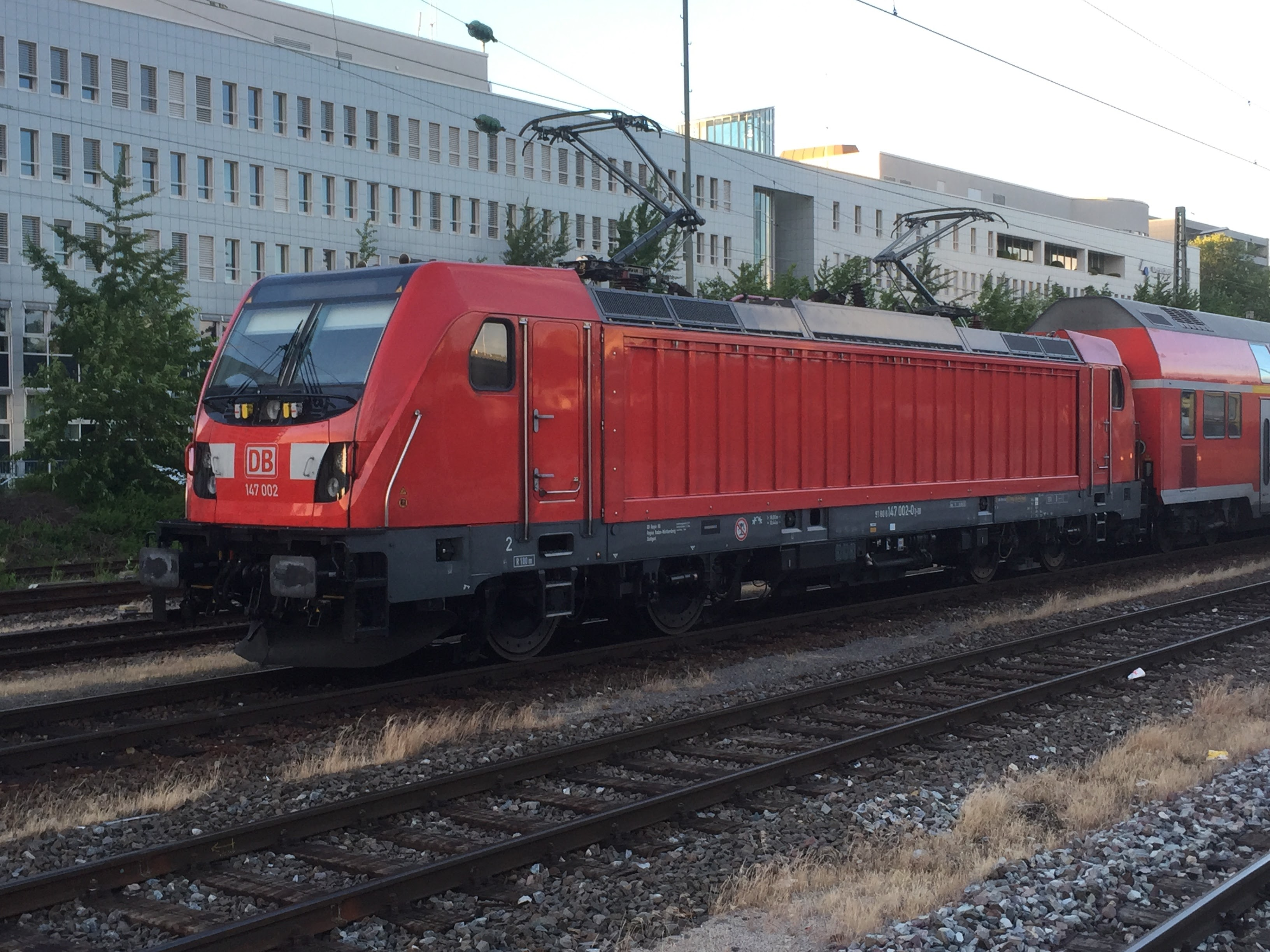 Bombardier TRAXX P160AC3 als 147 002 der DB Regio im Bahnhof Pforzheim, 6. Juni 2017